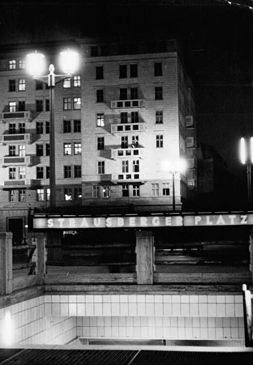 Berlin, Strausberger Platz, U-Bahn-Eingang, Nacht Zentralbild Weiß 4.9.1953 Die Stalinallee in Berlin bei Nacht. Der neue U-Bahn-Eingang am Strausberger Platz. Im Hintergrund der Block B-Nord.